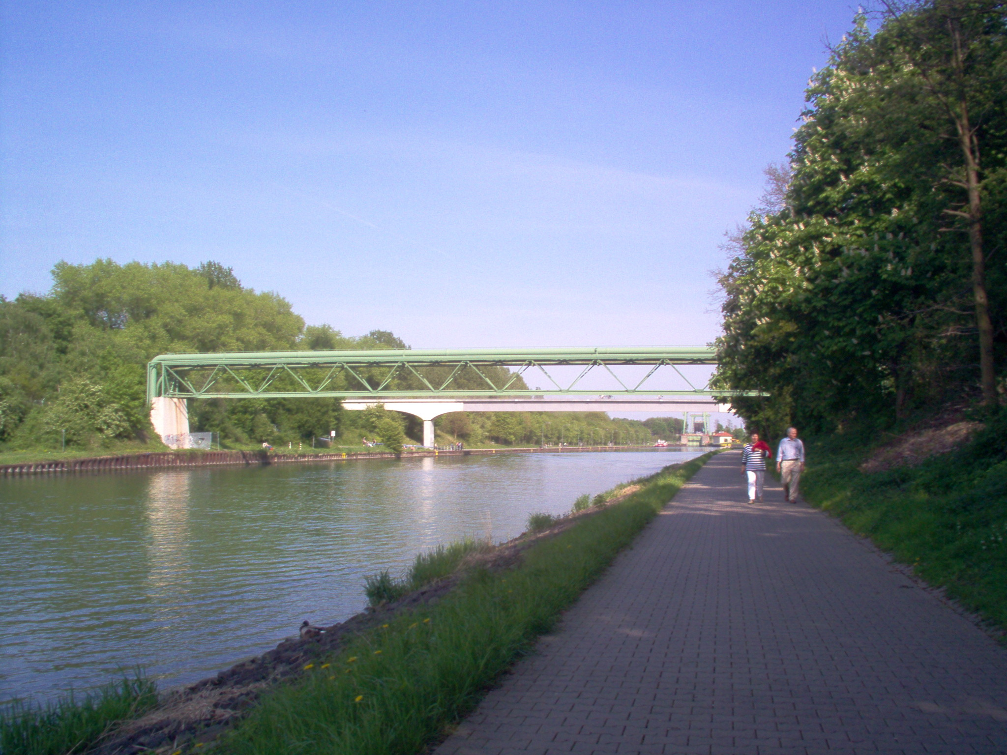 Der Wesel-Datteln-Kanal in Dorsten. Im Hintergrund die zwei Schleusen.